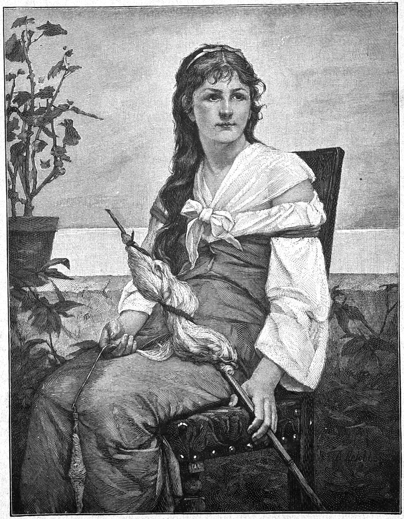 peinture de François-Alfred Delobbe